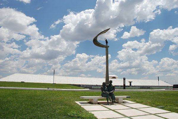 Mausolé du Président Juscelino Kubitschek